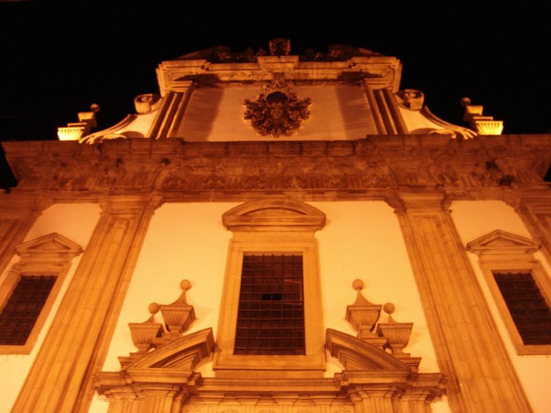 Igreja da Madalena (Chaves)